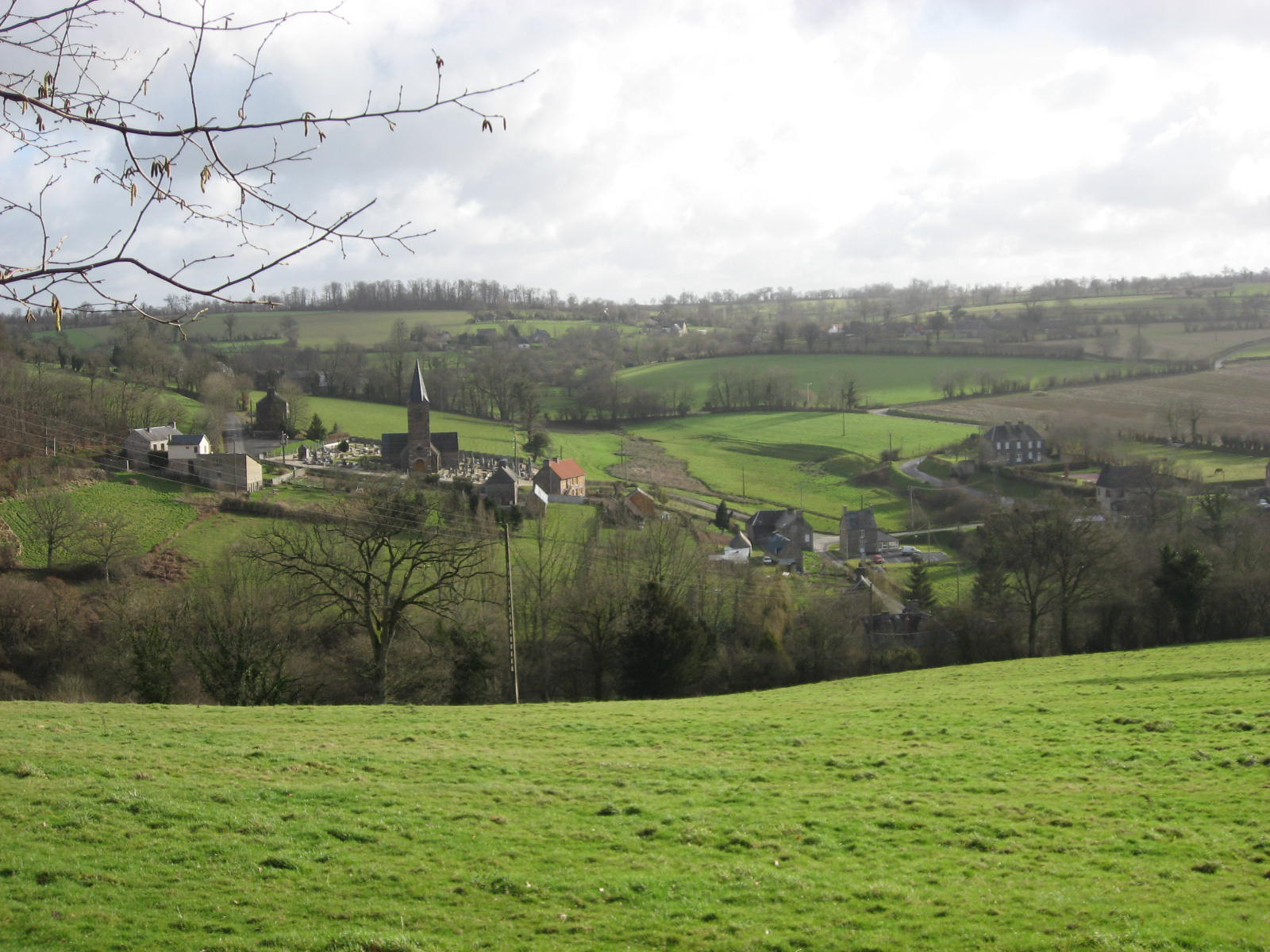 Le Bourg du village de Saint-Martin-Don